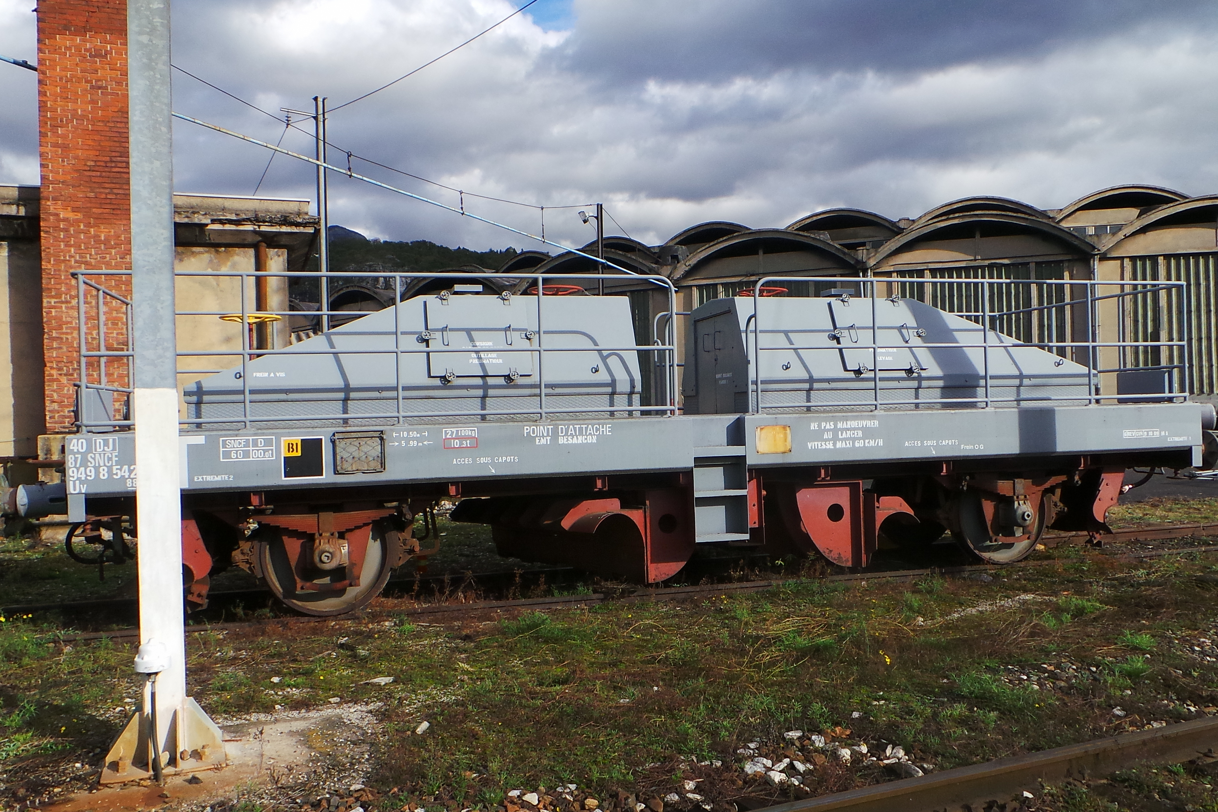 Wagon chasse-neige 40 DJ (40 DJ 87 SNCF 949 8 542-9) au dépot SNCF de Chambéry / Chambéry, Savoie, France